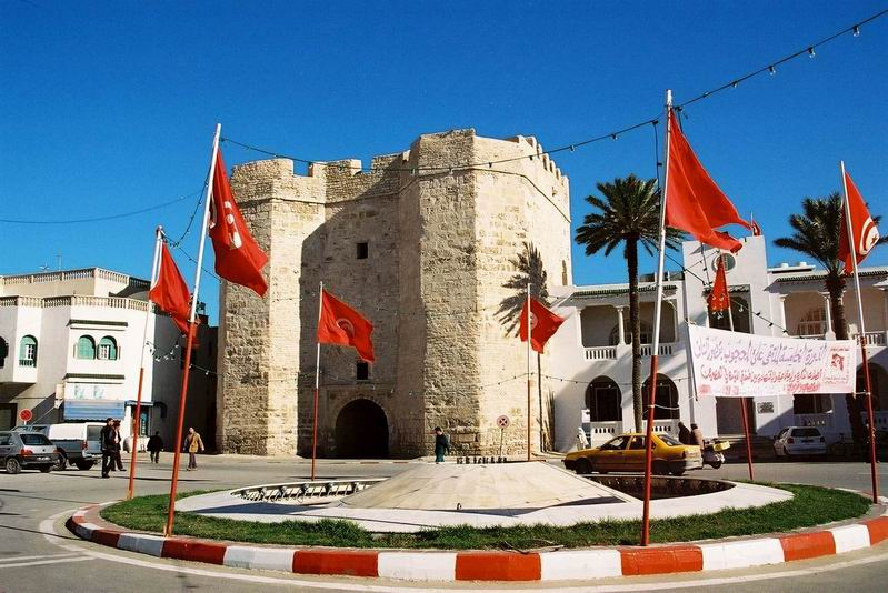 Skifa Kahla (Mahdia) : ancienne porte de la ville